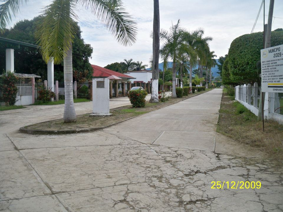 Boulevard en honor al señor Noel Rivera Rivera